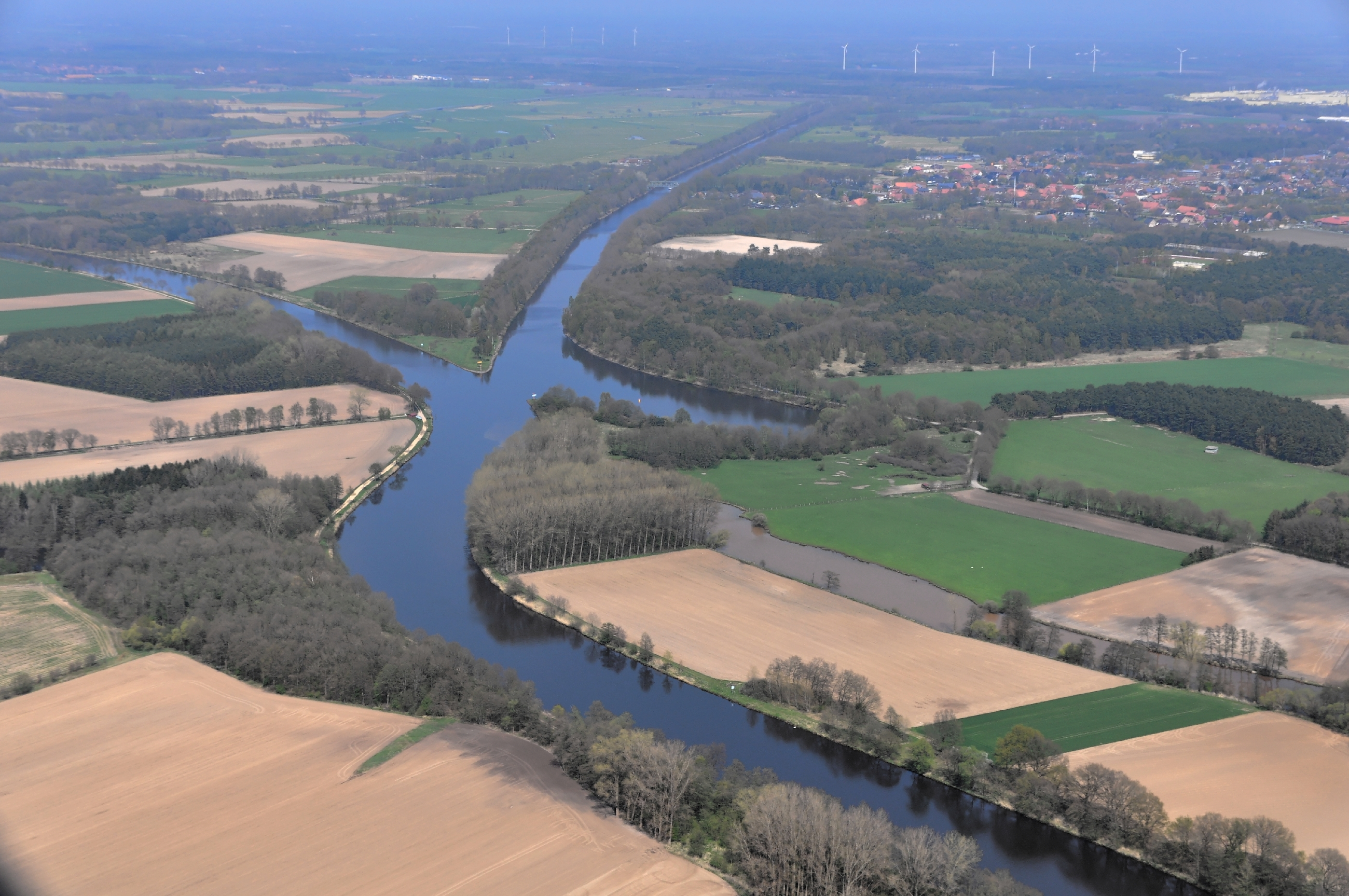 Luftbilder von der Nordseeküste 2013-05